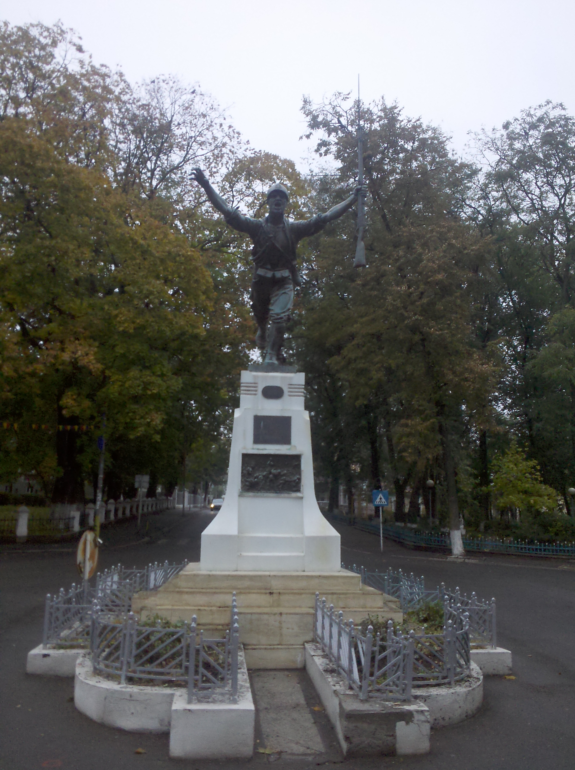 estatua en Dorohoi